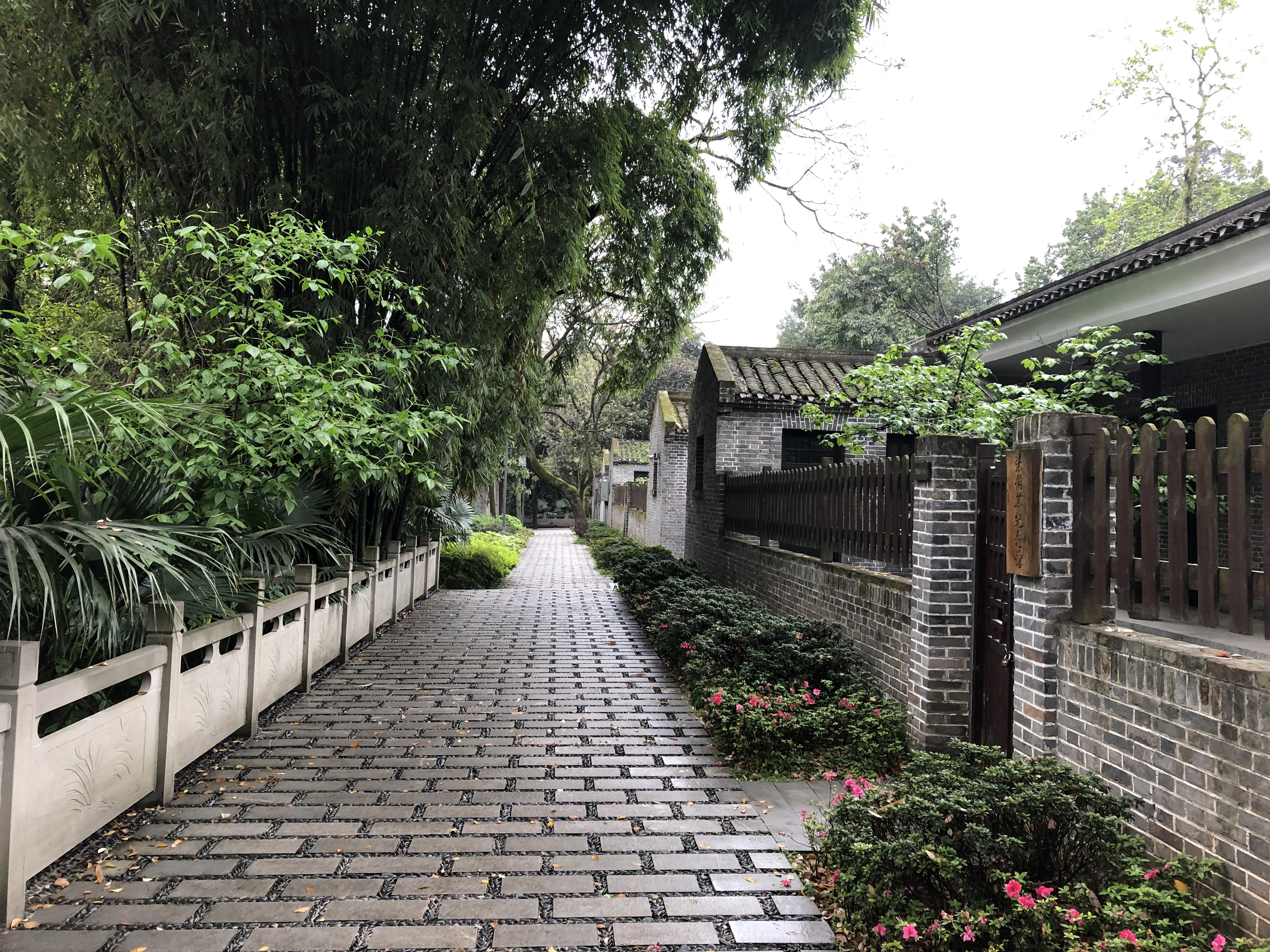 中文（中国大陆）: 济南村街景